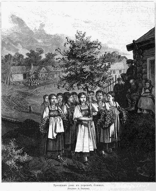 Троицын день в деревне. Семик